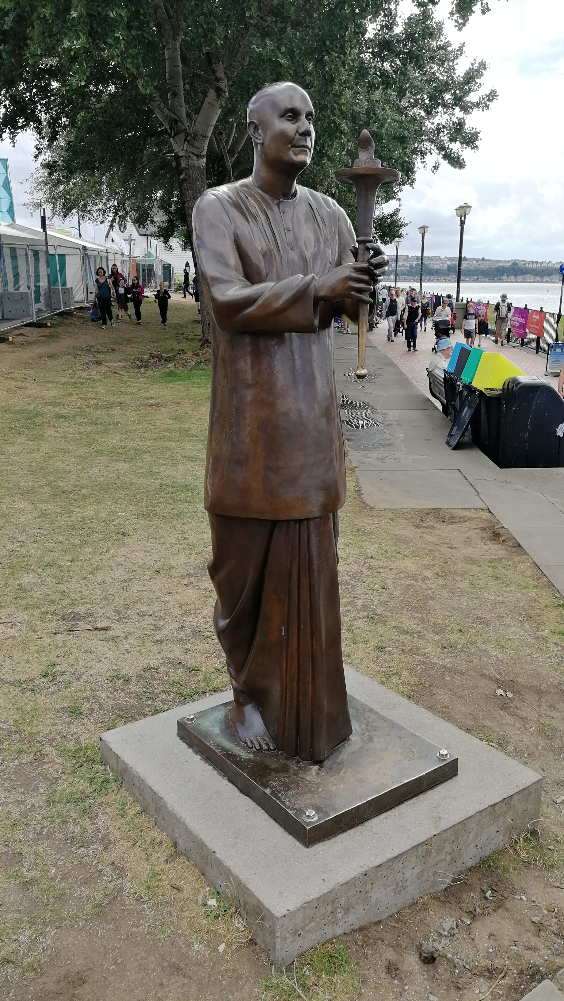 Cerflun Heddwch ar gyfer Tangnefedd y Byd